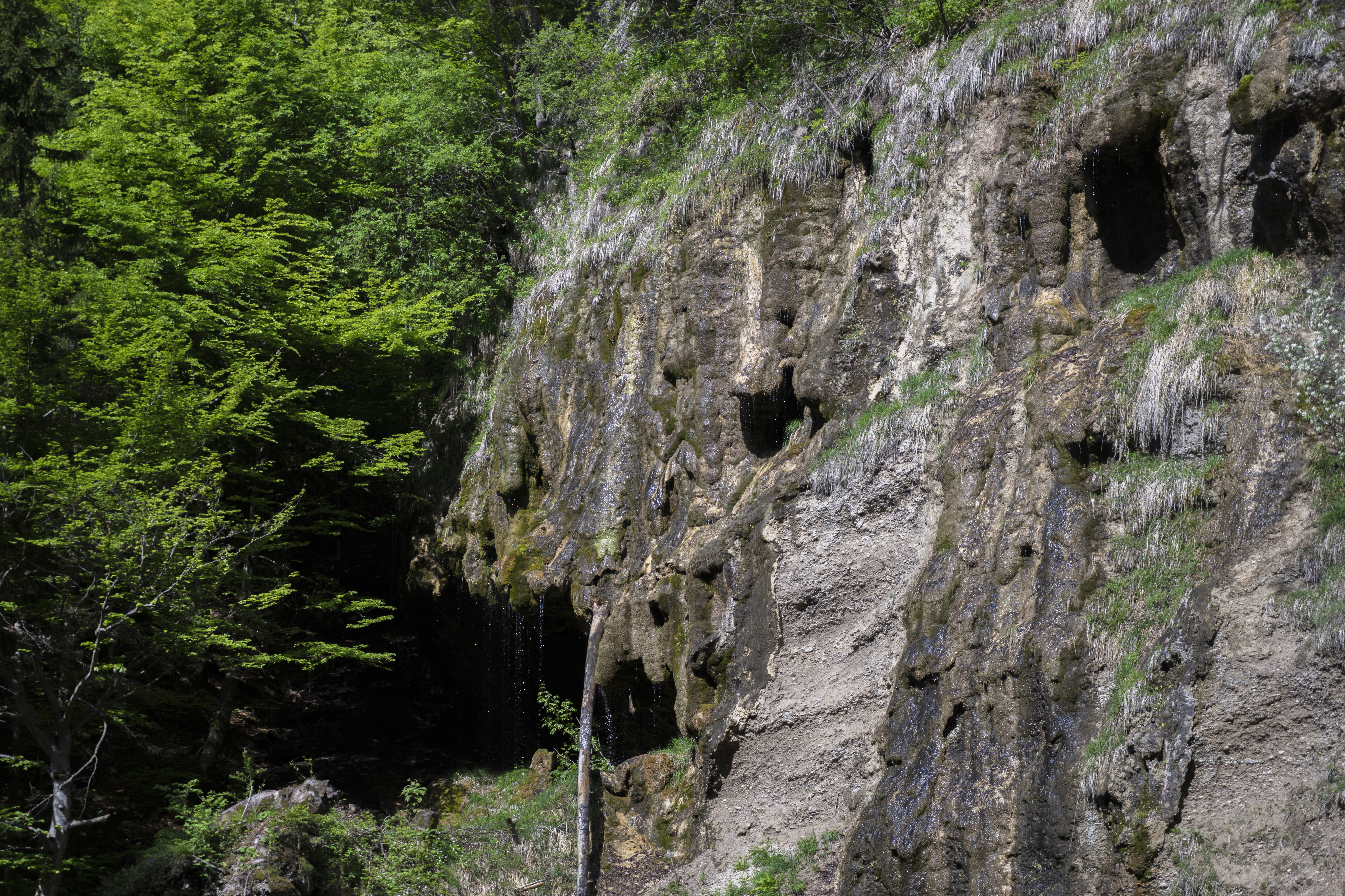 Altmoräne „Ewiger Regen“ in Maria Rain This media shows the natural monument in Carinthia with the ID KL 13.